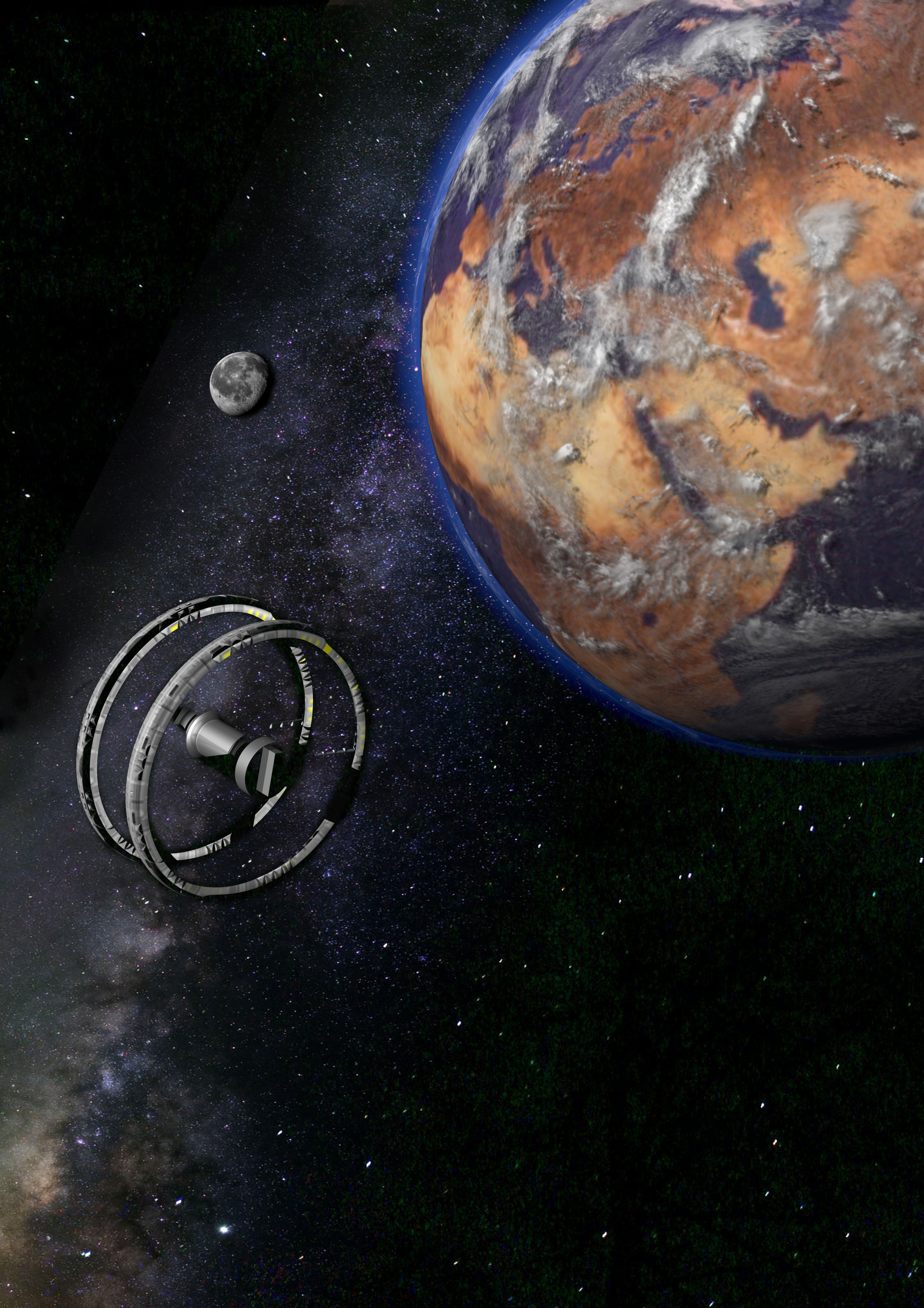 Rappresentazione artistica di una stazione orbitale ad anello attorno alla Terra